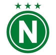 Antigo escudo da equipe